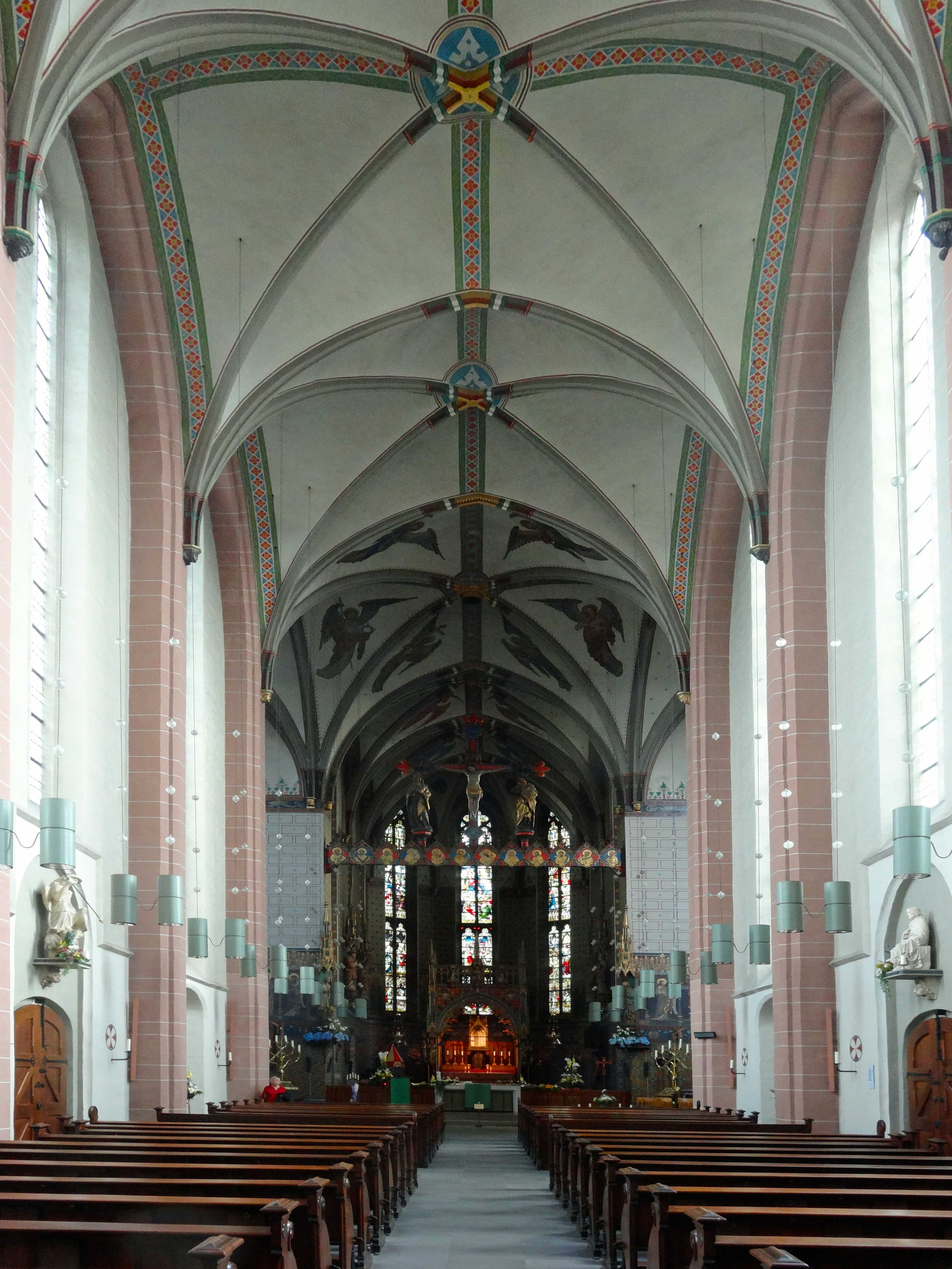 Interieur basiliek van onze lieve vrouwe tenhemelopneming in Zwolle